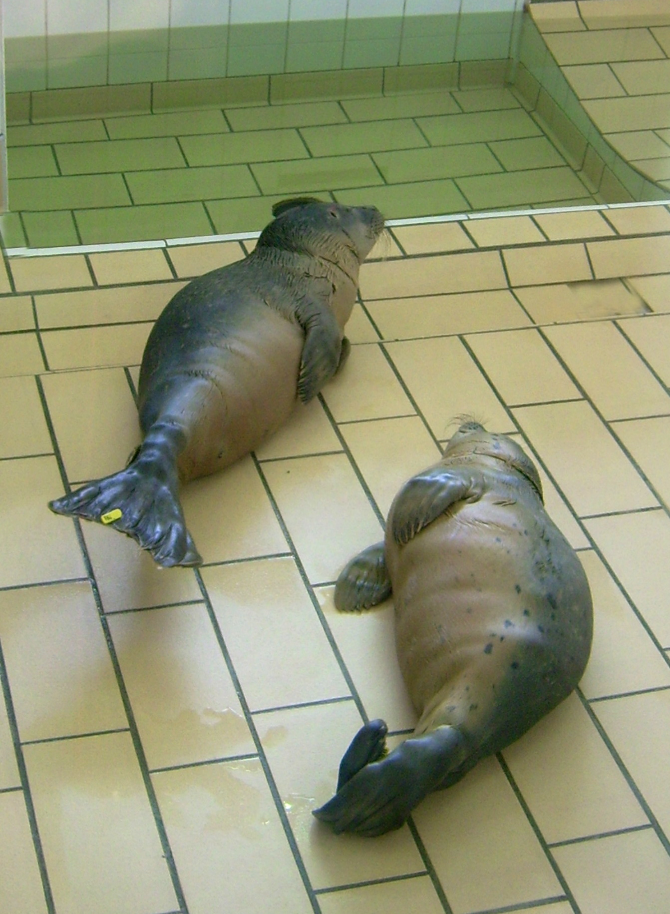 Robbe in der Auffangstation in Norden